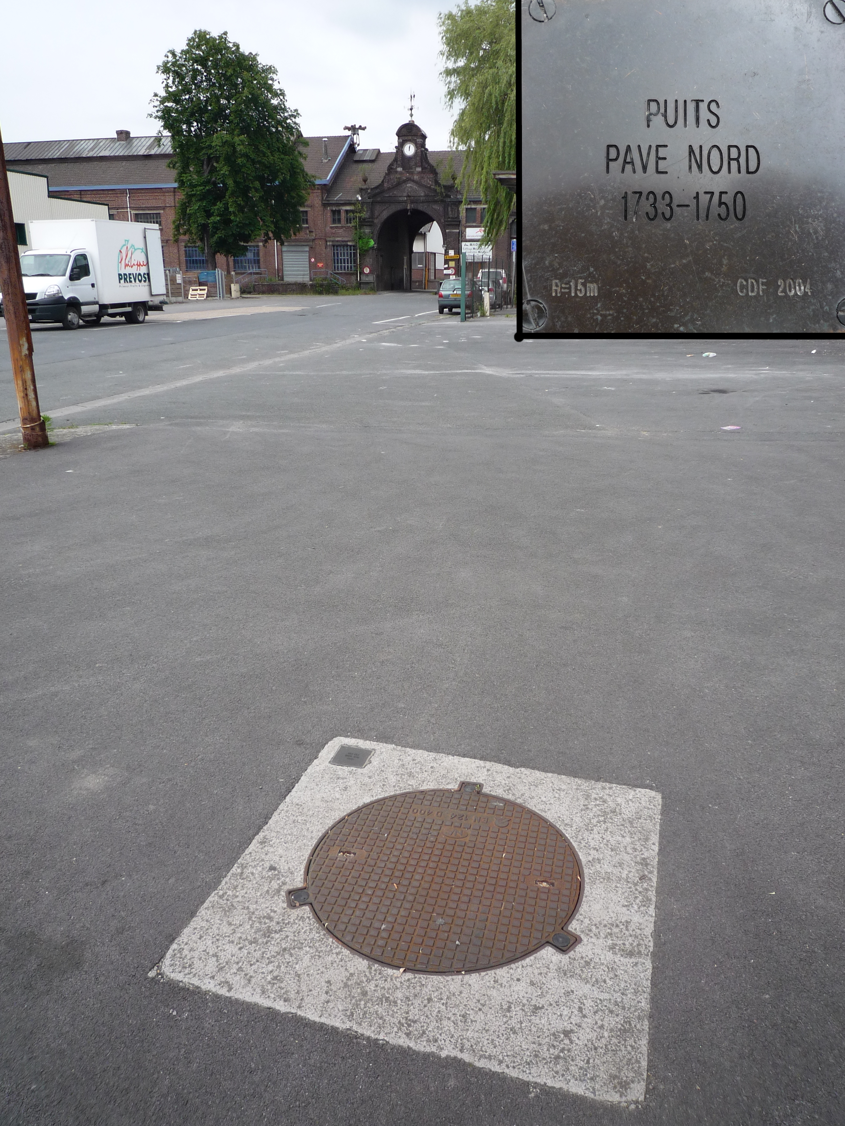 La fosse du Pavé de la Société Desandrouin-Taffin puis de la Compagnie des mines d'Anzin était un charbonnage du bassin minier du Nord-Pas-de-Calais constitué de deux puits situé à Anzin, Nord, Nord-Pas-de-Calais, France.